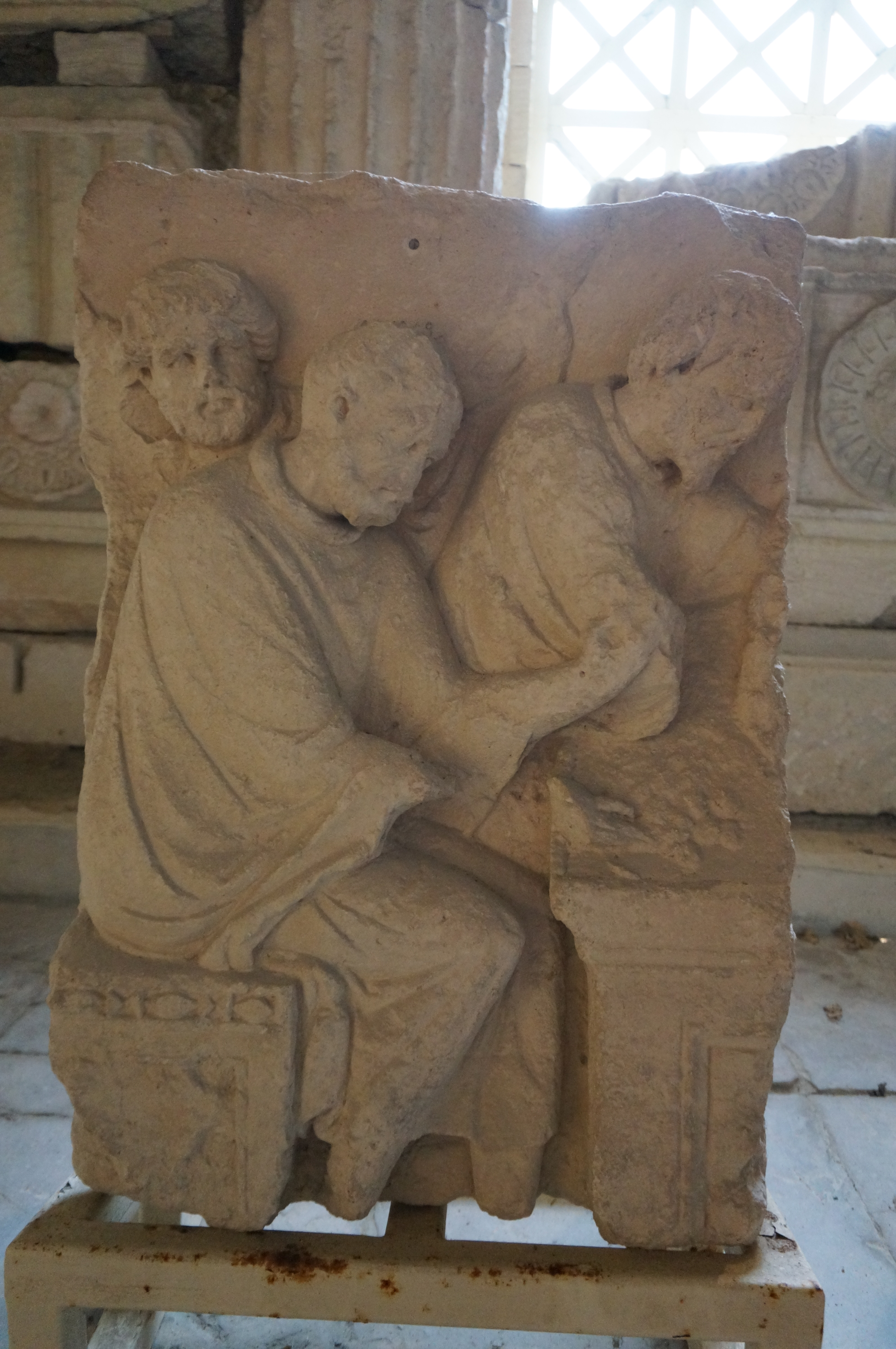 sulpture présentée au musée.